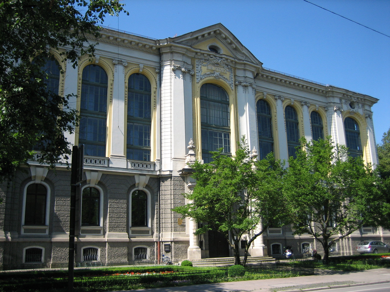 Staats- und Stadtbibliothek in Augsburg, Frontseite zur Schaezlerstr.